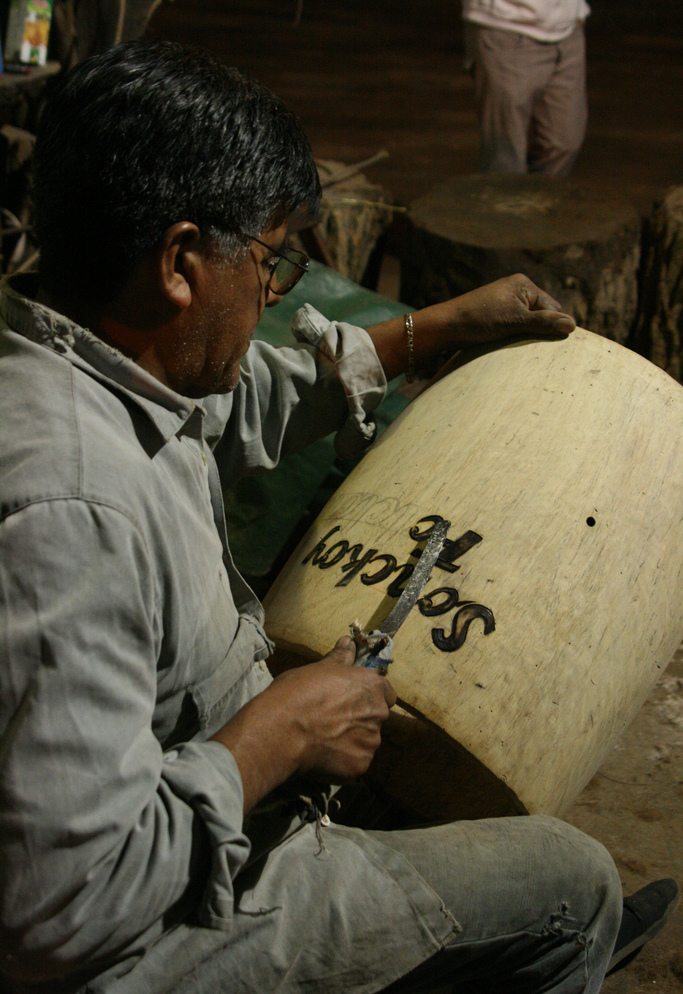 El luthier Froilán Gonzalez durante el proceso de fabricación de un bombo legüero